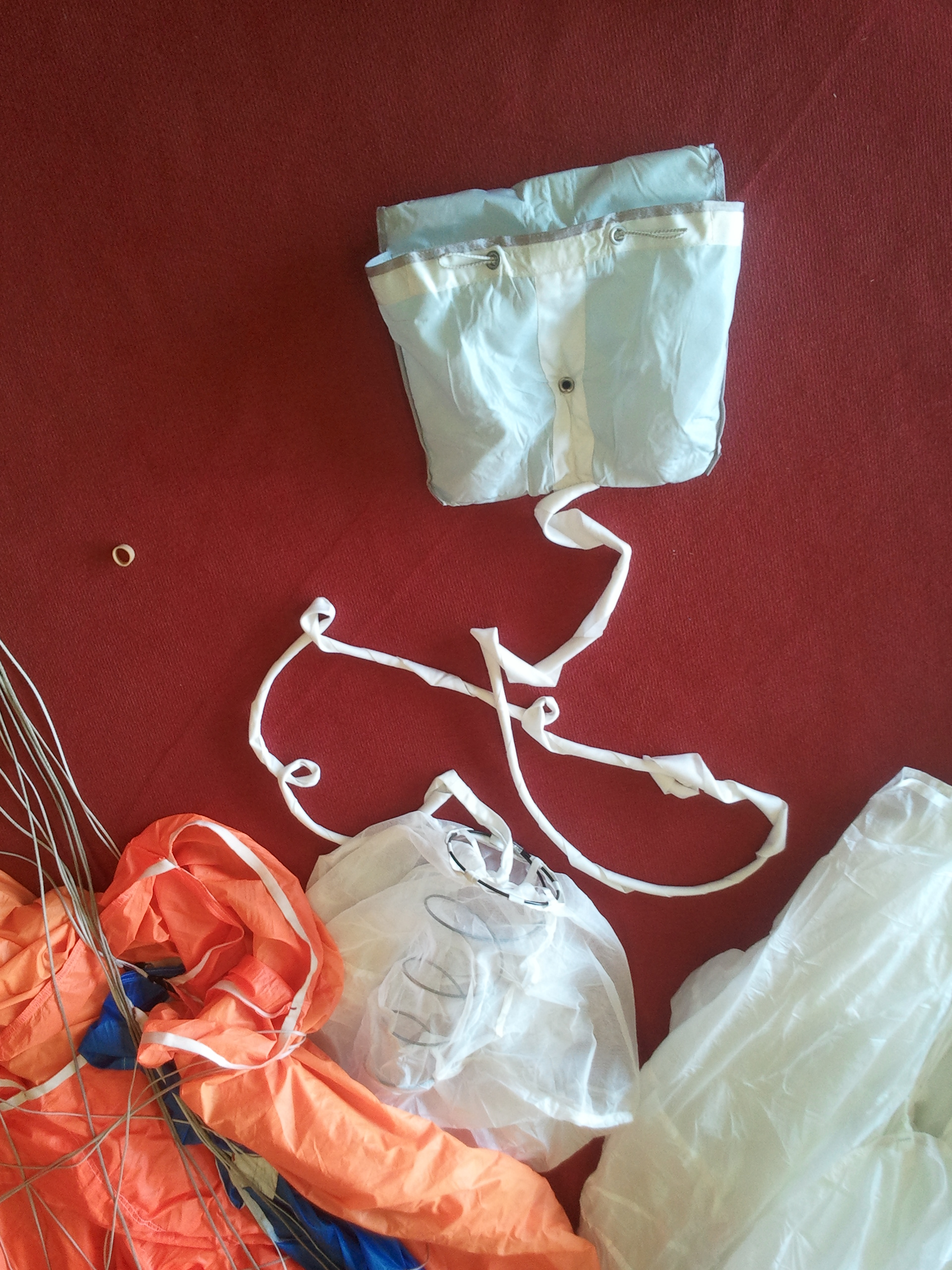 La libération est la première étape de la procédure de secours (PDS). Elle consiste à désolidariser les élévateurs de la voile principale du sac-harnais via le système trois anneaux (voir l'article sur Wikipédia). En haut, le POD de la voile de secours n'est pas solidaire de la voile de secours. L'extracteur de la voile de secours contient un ressort pour que l'ouverture se fasse le plus vite possible, mais aussi pour éloigner le POD le plus possible du parachutiste afin qu'il soit dans le vent relatif et que la voile de secours s'ouvre avec le moins d'interférence possible.